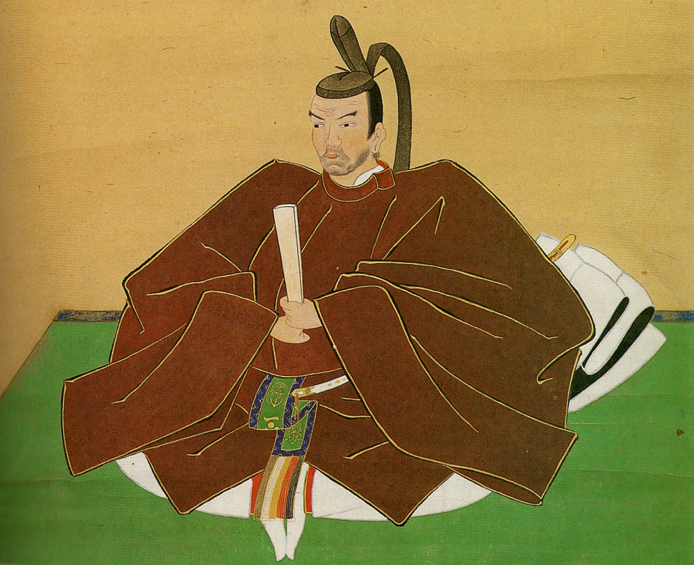 徳山藩三代藩主・毛利元次の肖像画。